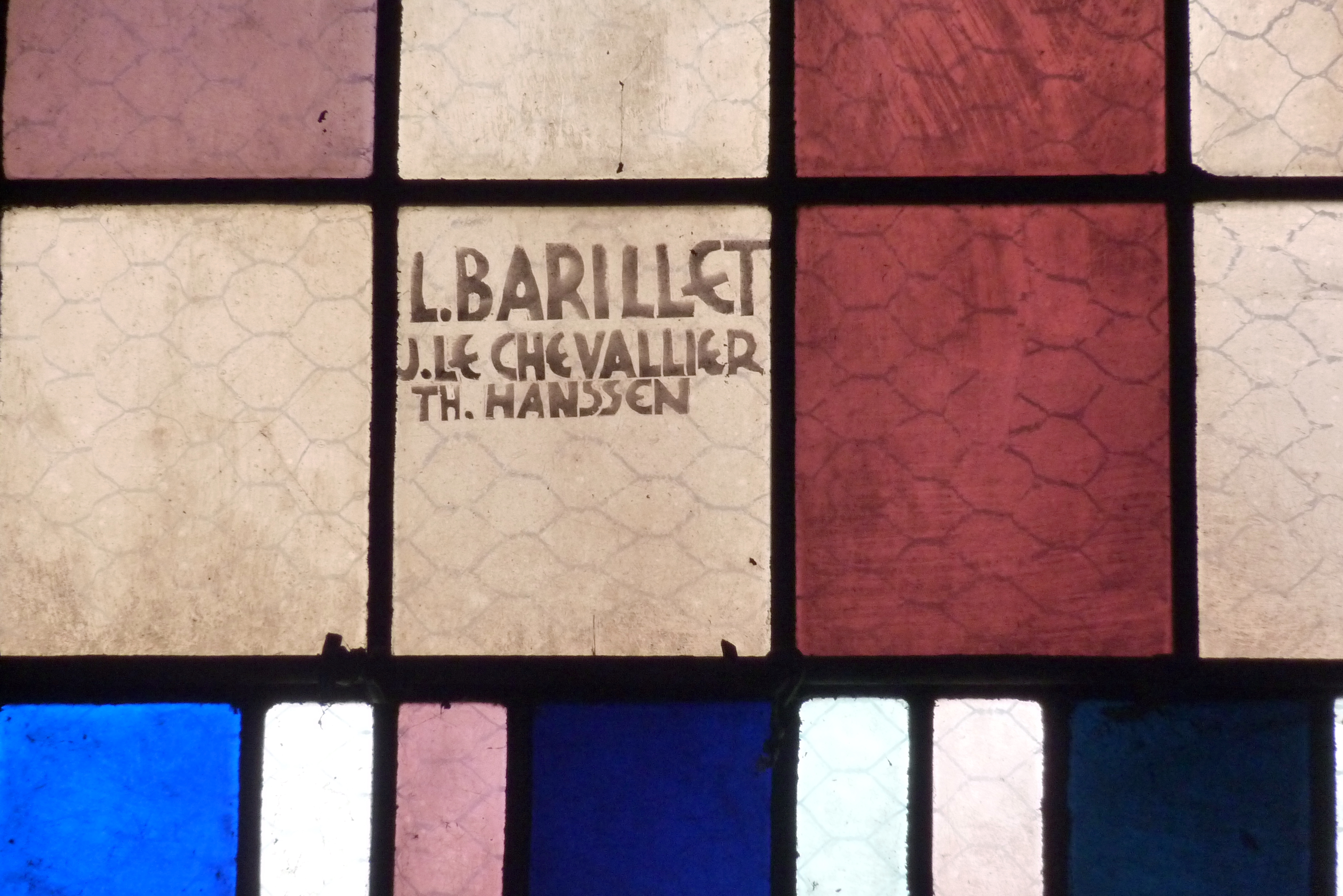 Bleiglasfenster (Ausschnitt) in der katholischen Pfarrkirche Saint-Pierre-et-Saint-Paul in Jouarre, Signatur: "L. BARILLET J. LE CHEVALLIER TH. HANSSEN" (= Louis Barillet + Jacques Le Chevallier + Théodore-Gérard Hanssen)